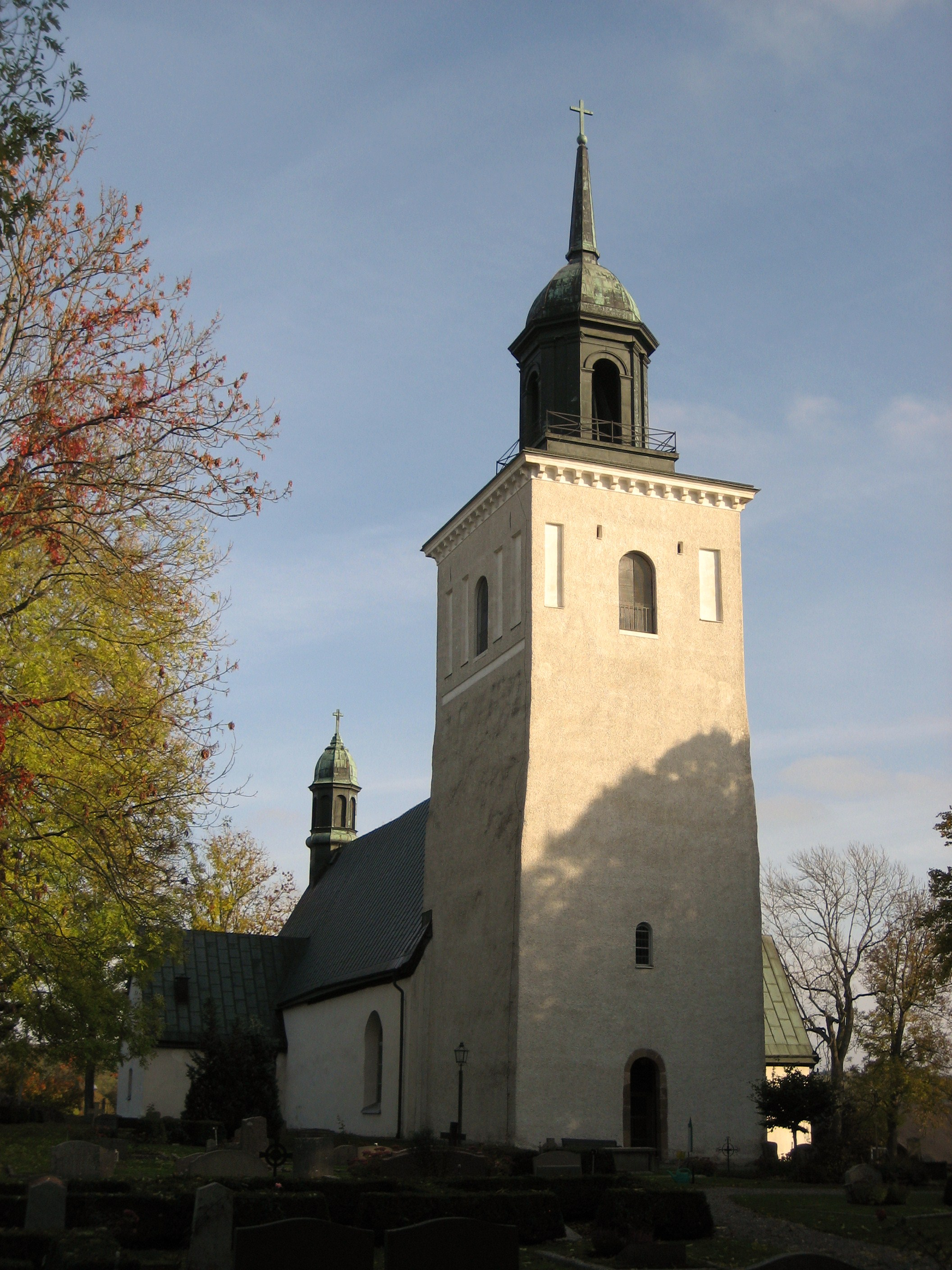 Sollentuna kyrka.